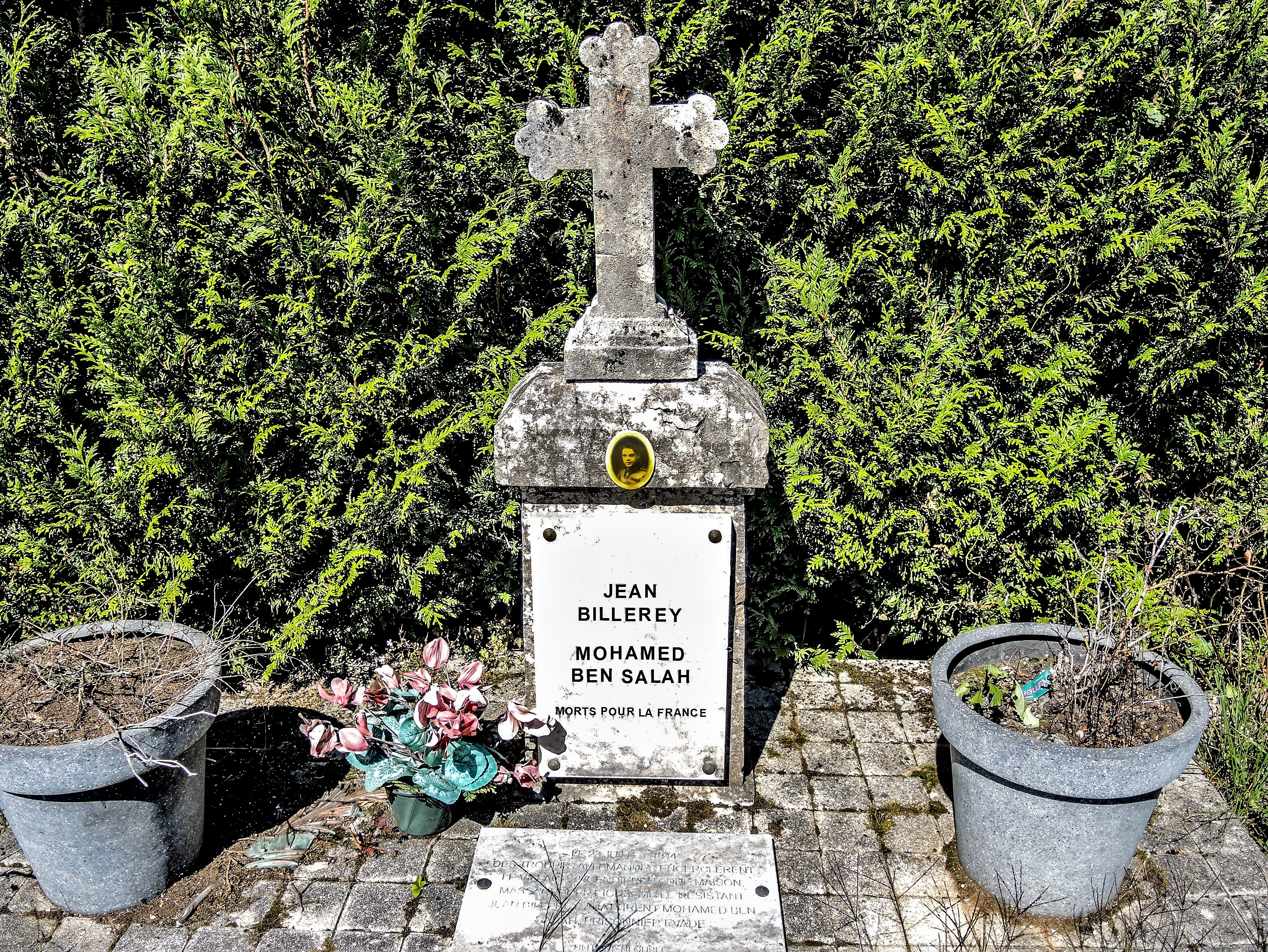 Stèle avec épitaphe. Montivernage. Doubs